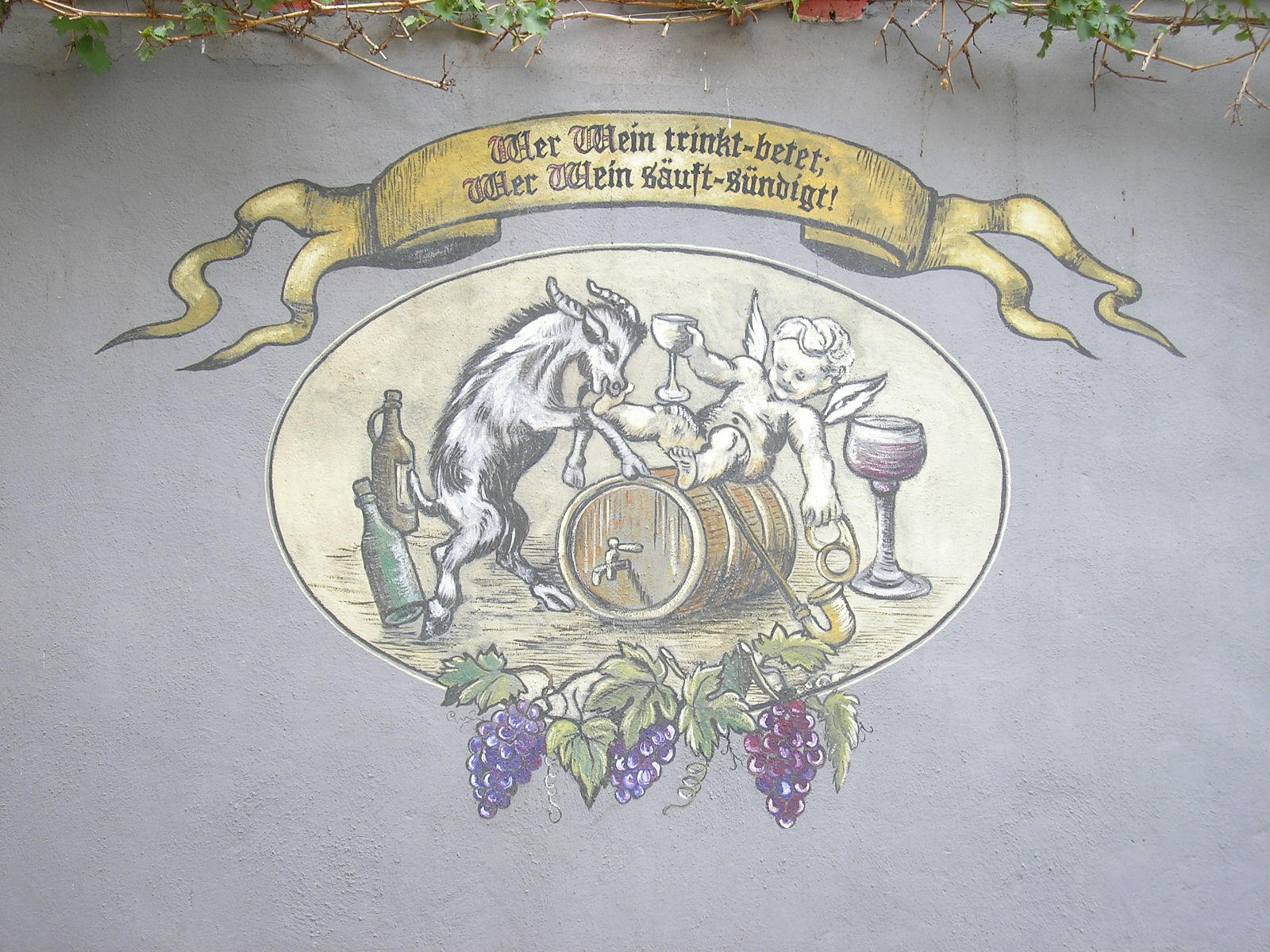 Verzierung an einer Hauswand in Bad Langensalza (Thüringen)